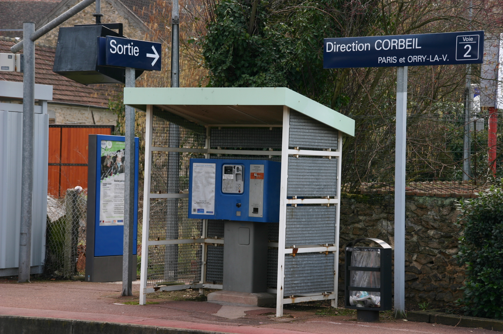 La gare de Boissise-le-Roi, Boissise-le-Roi, département de la Seine-et-Marne (France)